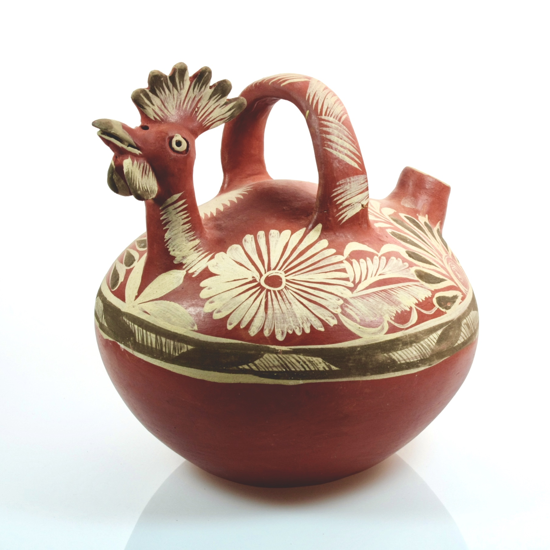 Xumo de barro, recipiente para contener y transportar liquidos, elaborado por Guadalupe Hernández, originaria de Chililico, Hidalgo